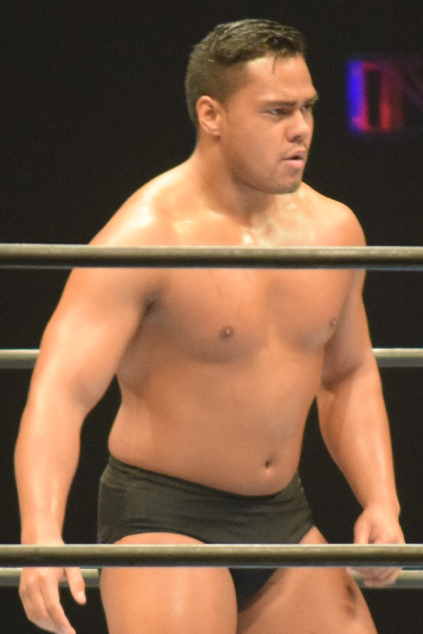 2017年2月11日 大阪府立体育会館 「THE NEW BEGINNING in OSAKA」 ヘナーレ